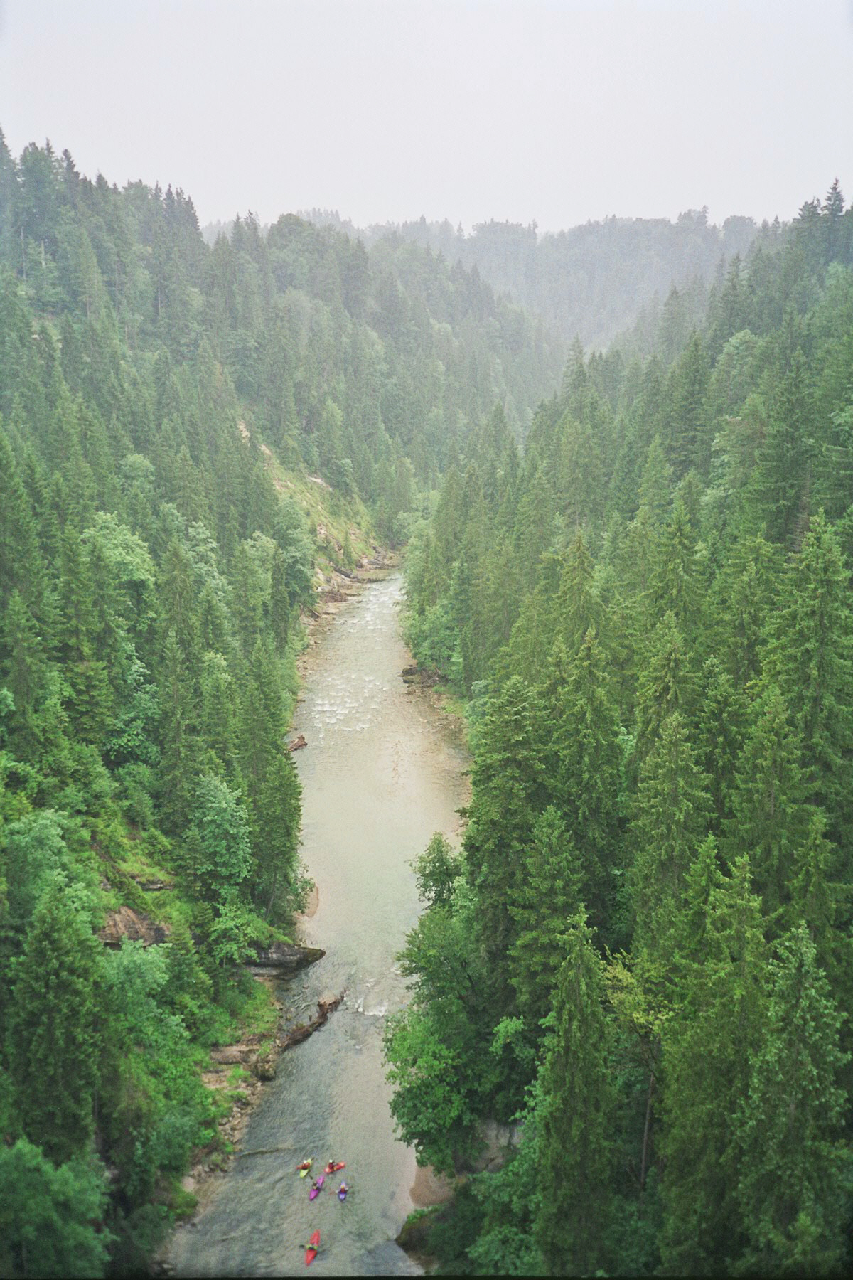 Bild der Ammerschlucht bei Rottenbuch